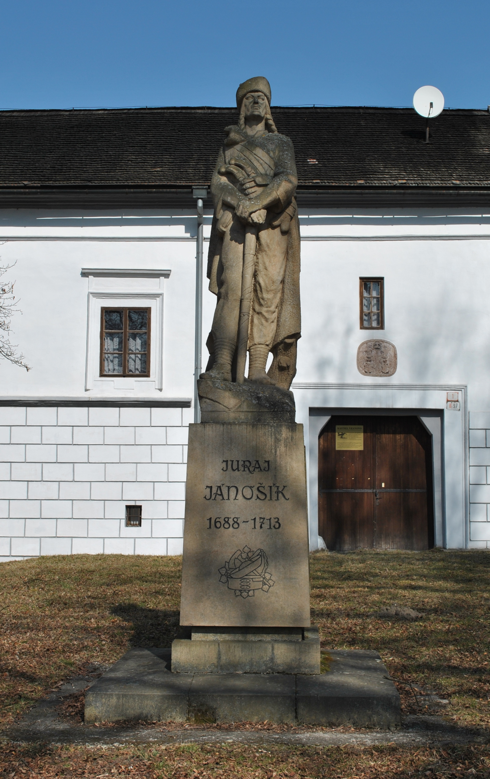 Plastika